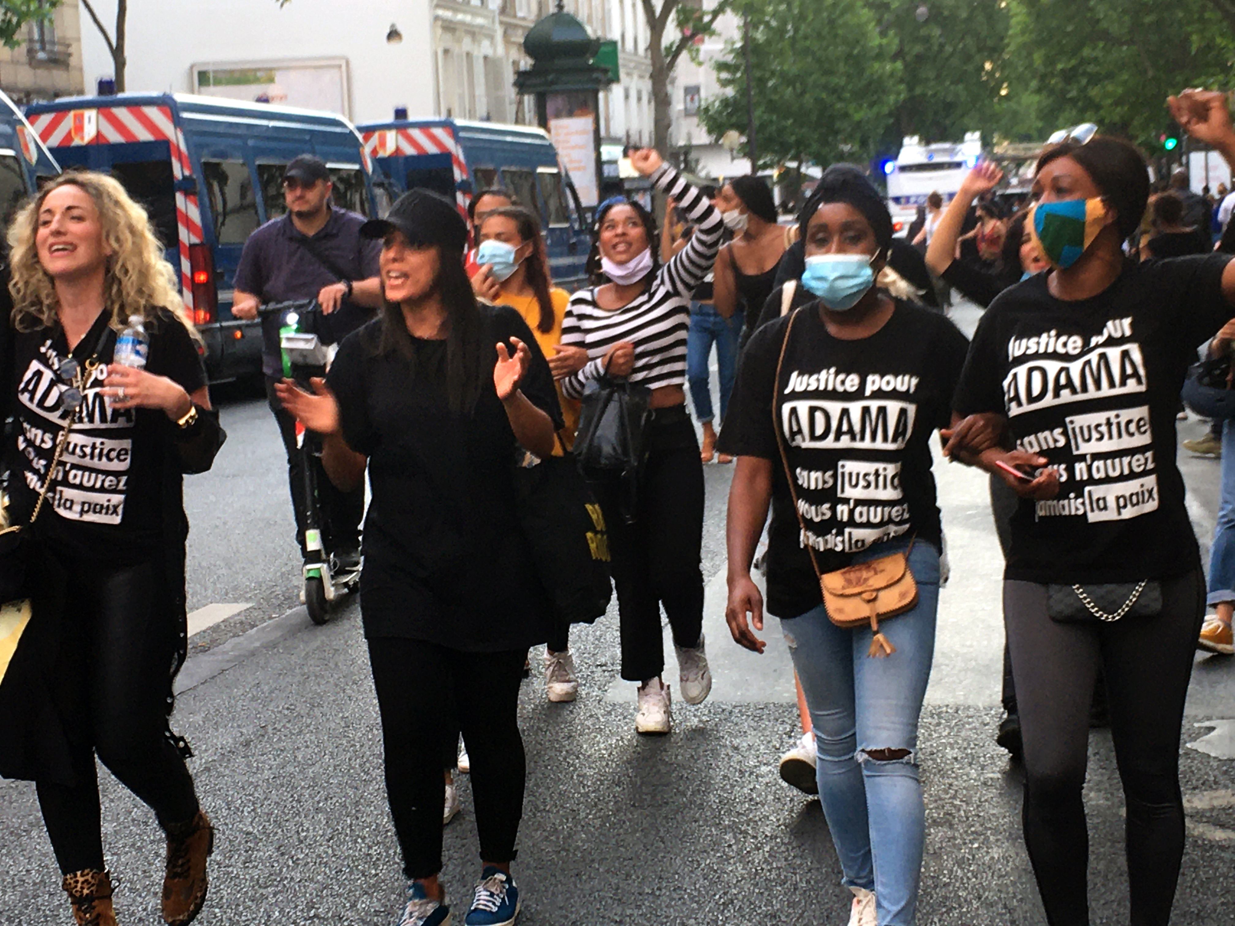 Paris Batignolles 2 juin 2020 manifestation pour Adama et George